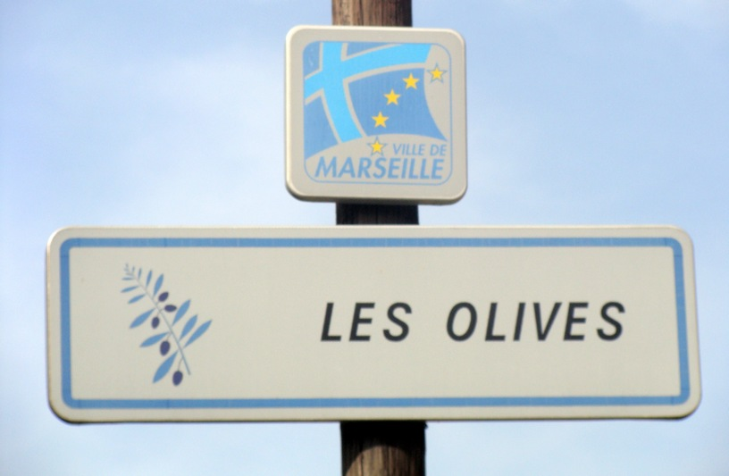 Panneau d'entrée du quartier "Les Olives", à Marseille, 13e arrondissement.